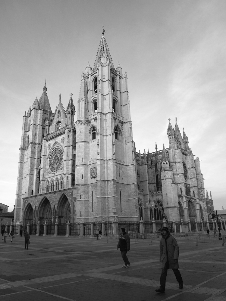 Catedral de León, España.